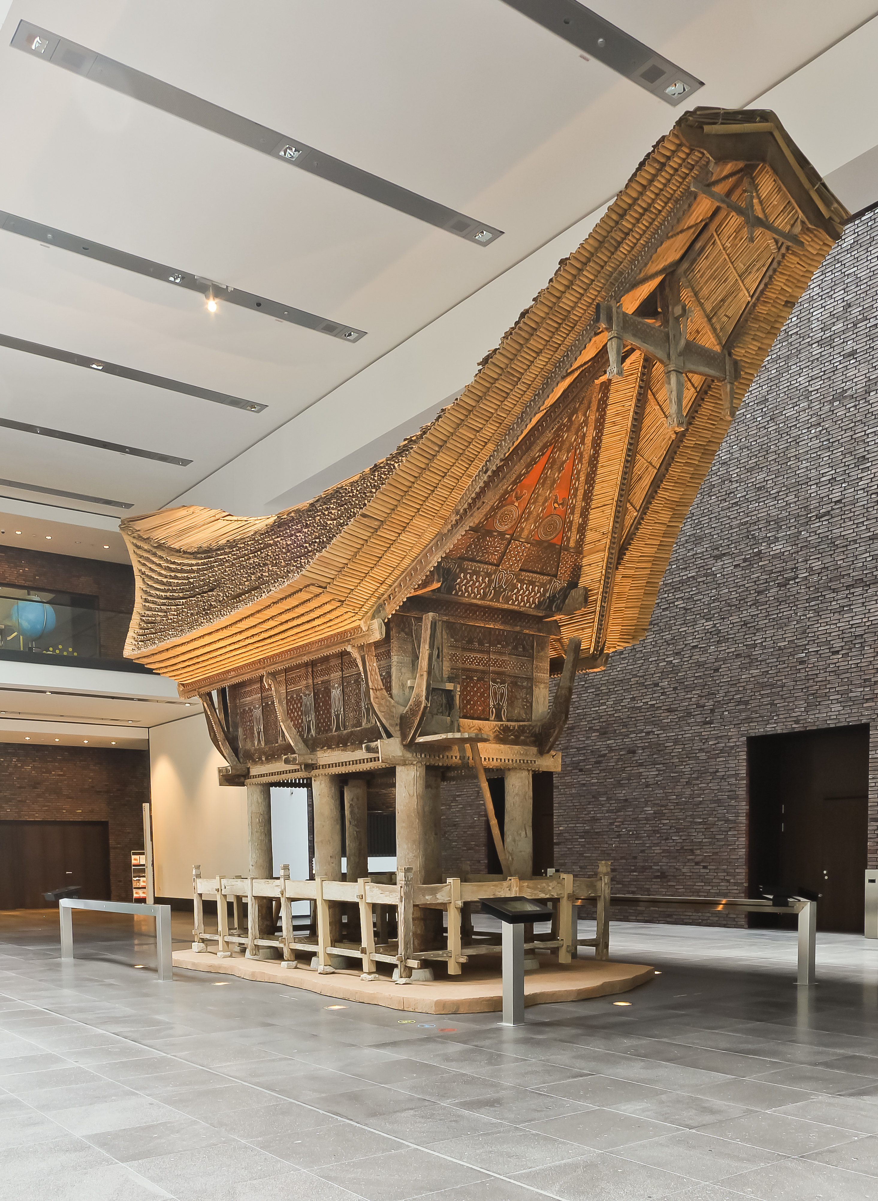 Reisspeicher alang sembang, Pantanakan Lolo, Region Kesu’, Sa’dan Toraja/Tana Toraja, Südsulawesi, Indonesien, Südostasien. Er ist im Foyer des Kulturquartiers aufgebaut.